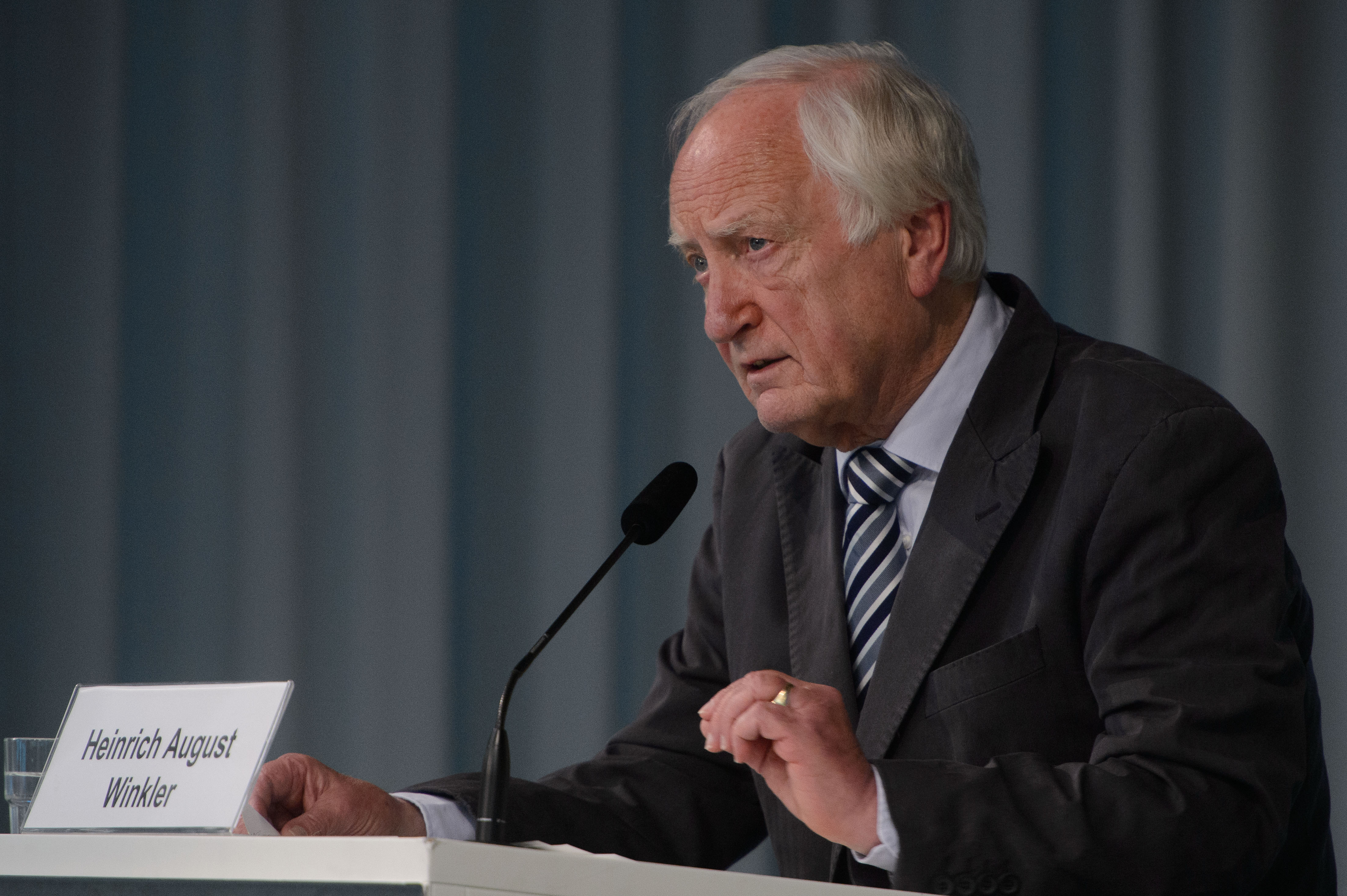 Prof. Dr. Heinrich August Winkler (Professor em. für Neueste Geschichte, Humboldt-Universität Berlin)